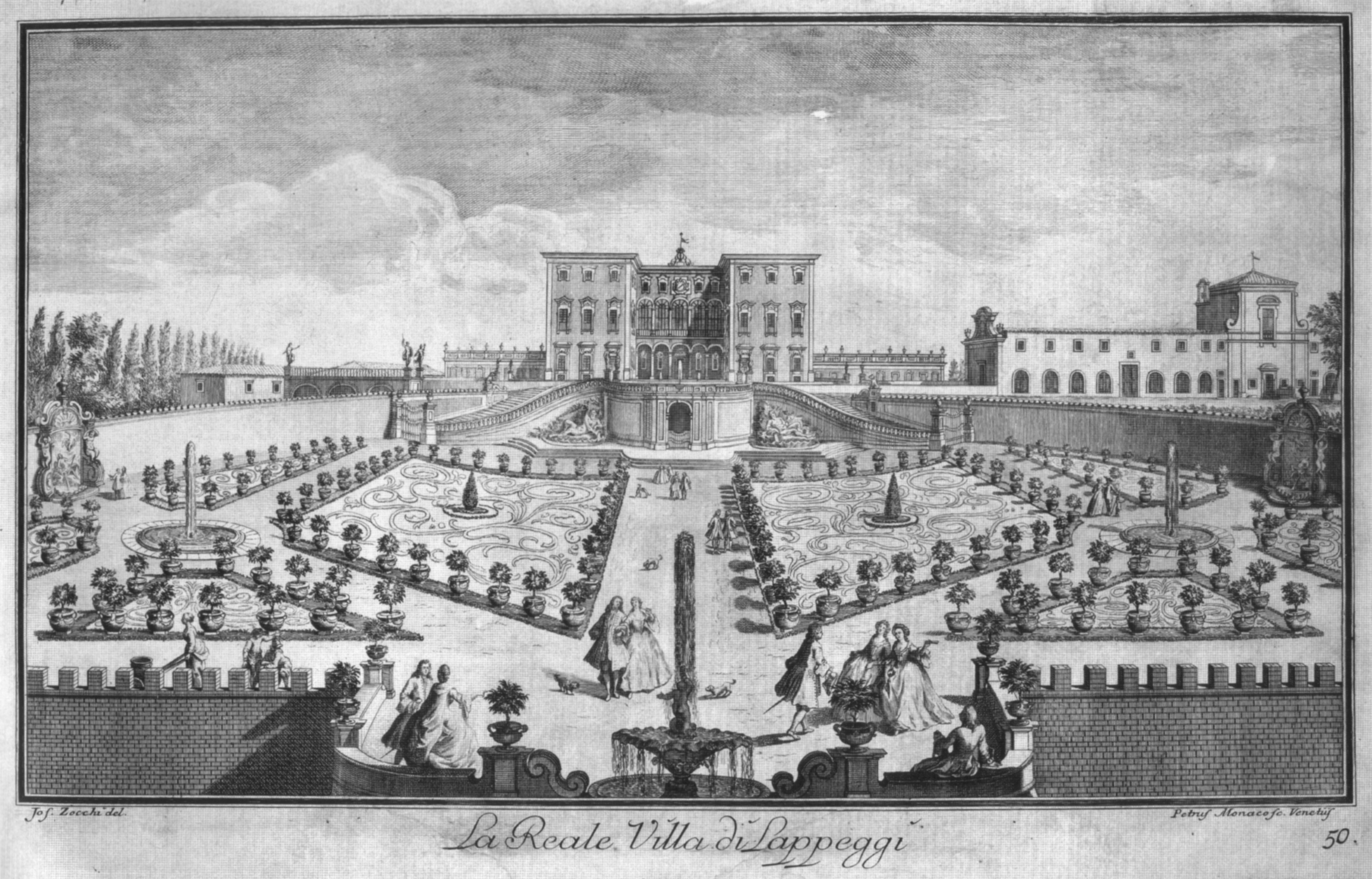 Zocchi, ville 52 lappeggi